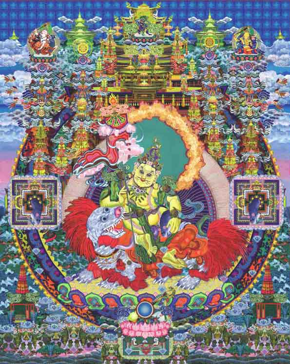 Vaishravana